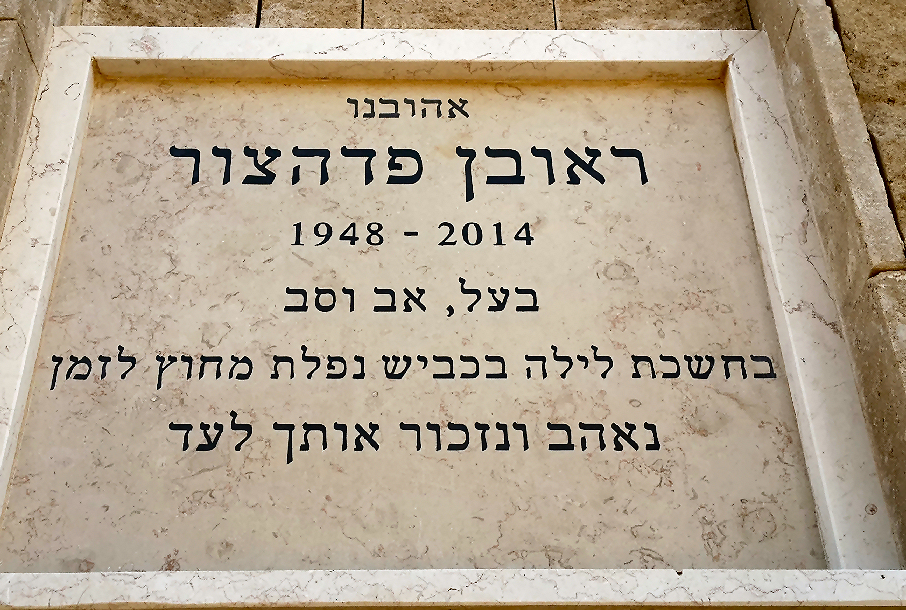 המצבה על קברו של ראובן פדהצור